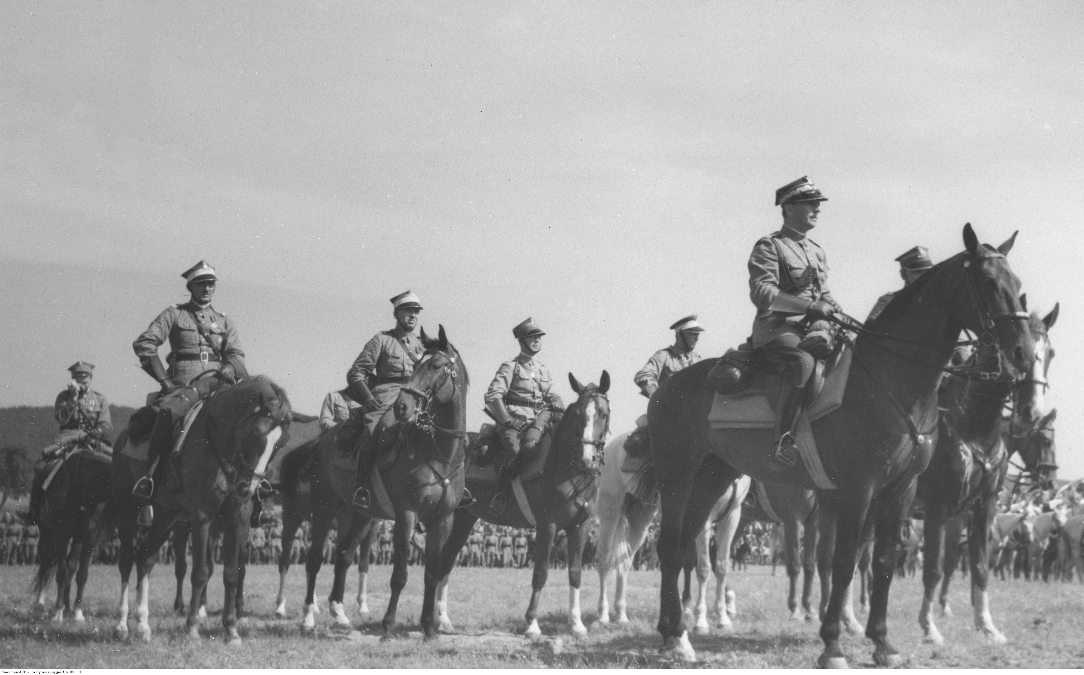 Rocznica bitwy warszawskiej – uroczystości Święta Żołnierza w Wejherowie 15 sierpnia 1938. Przedstawiciele wojska podczas mszy św. Na pierwszym planie z prawej dowódca Pomorskiej Brygady Kawalerii gen. Stanisław Grzmot-Skotnicki. Koncern Ilustrowany Kurier Codzienny - Archiwum Ilustracji. Sygnatura: 1-P-3383-8